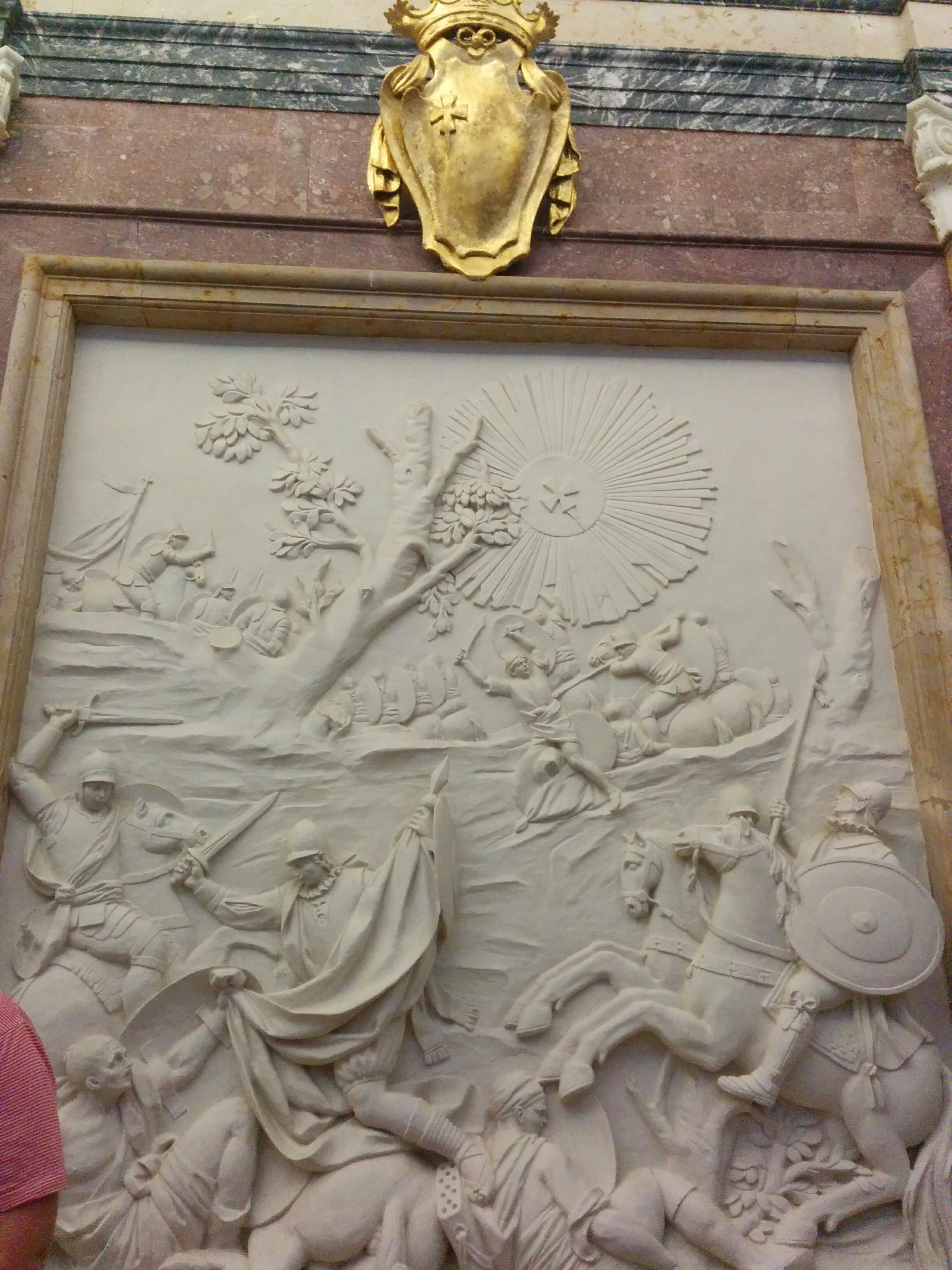 Karezko erliebea, 18. mendeko 2. zatia, Aragoiko errege-erreginen panteoia, San Juan de la Peñako monastegia, Aragoi